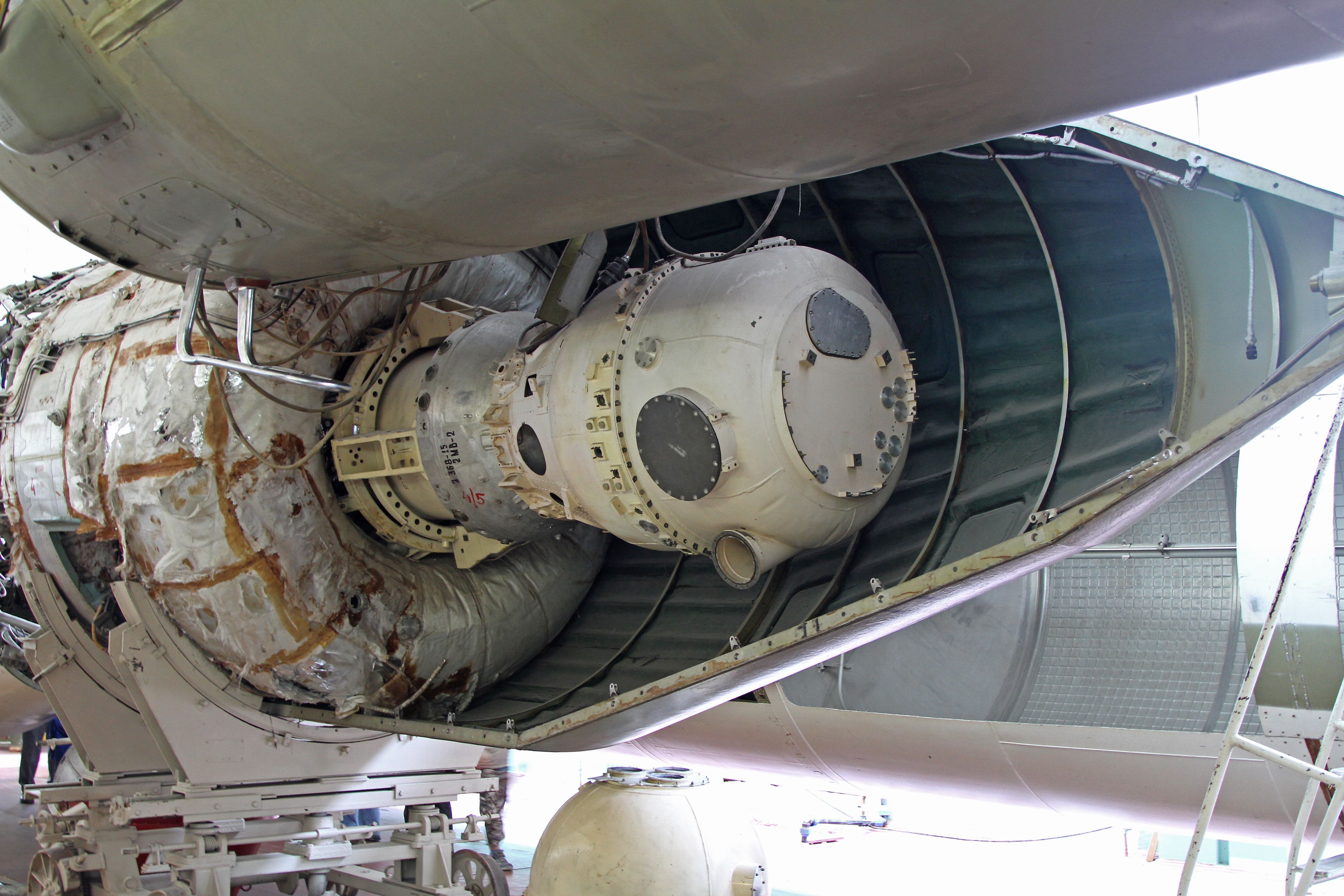 Блок Л РН "Молния" и АМС 2МВ